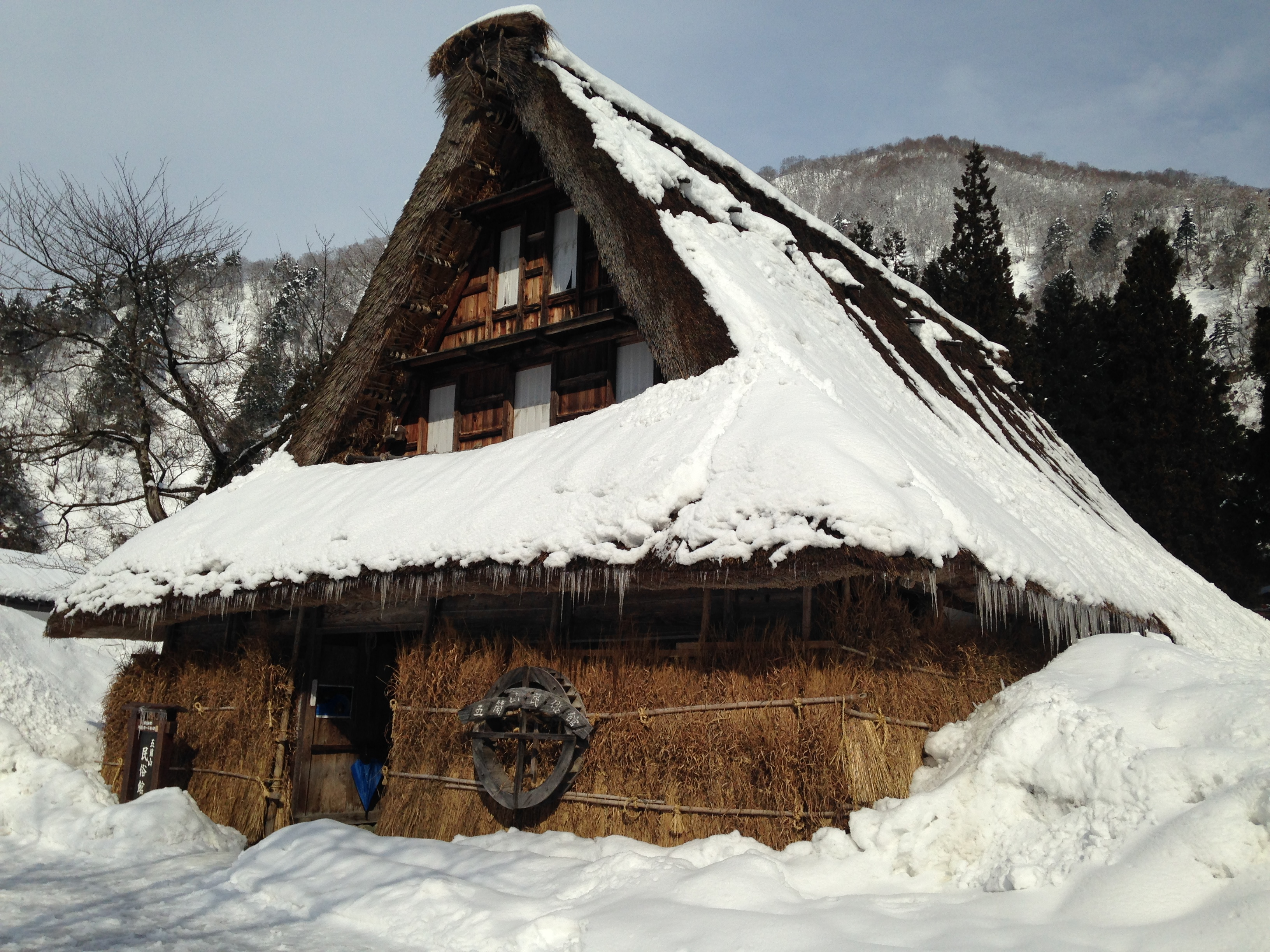 雪の五箇山民俗館